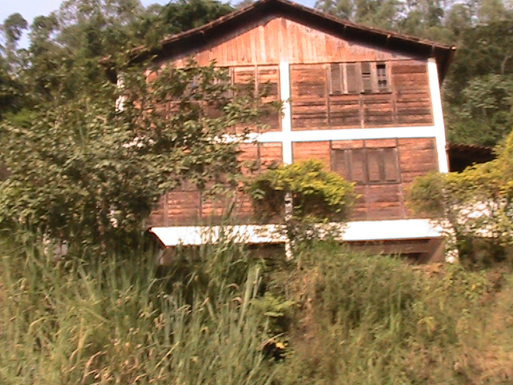 Chalé em Santa Rita de Jacutinga, Minas Gerais, Brasil.